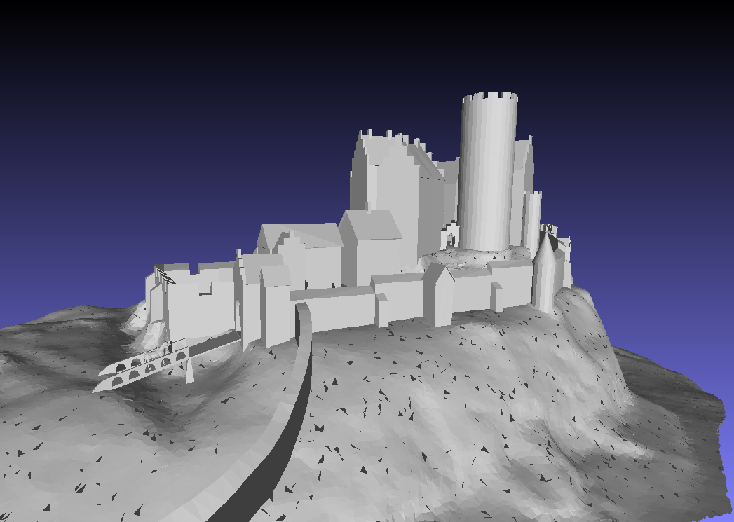 3D-Modell Siegesburg auf historischem Kalkberg (um 1600) von Osten (im Museum Alt-Segeberger Bürgerhaus)